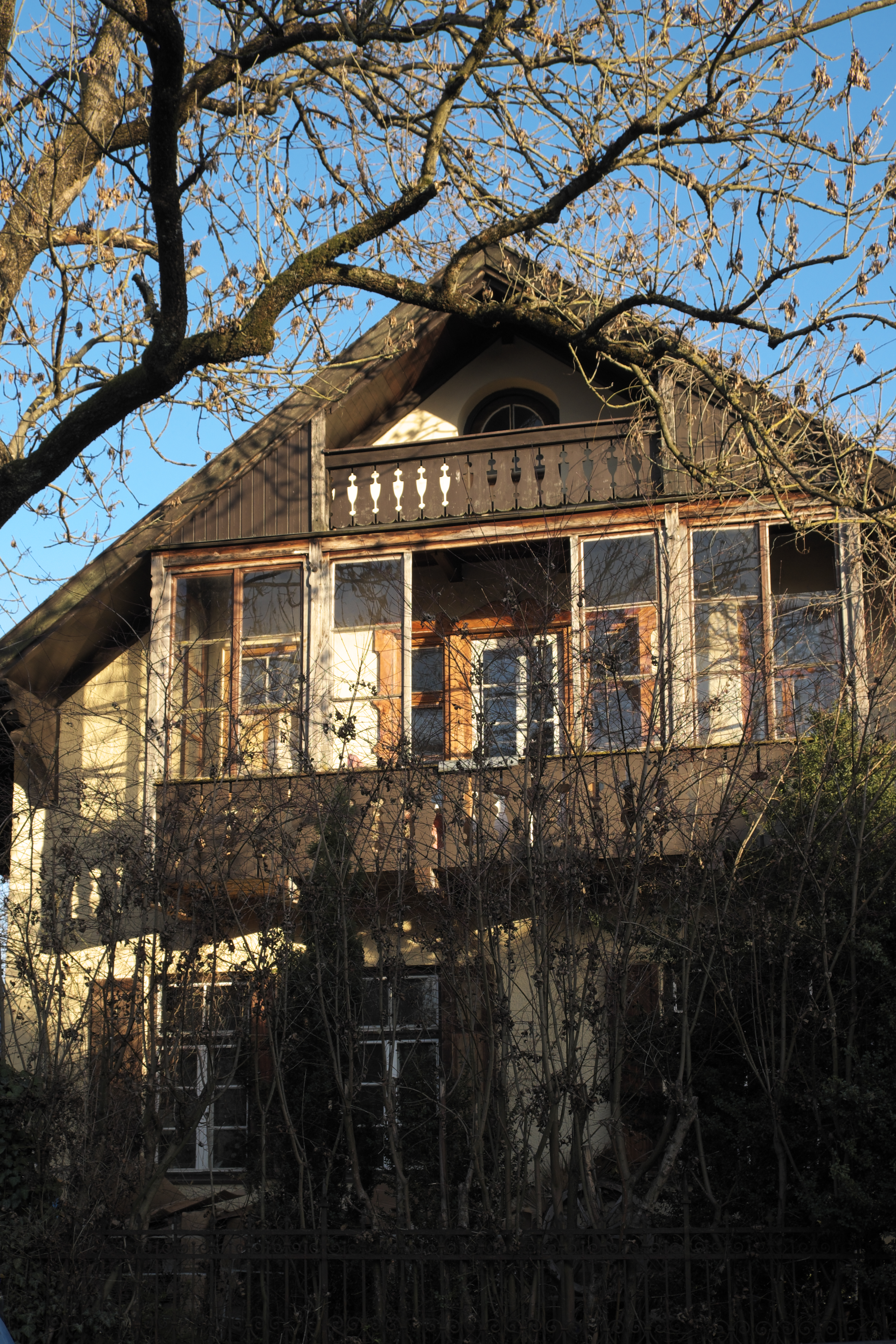 Villa in der Fritz-Reuter-Straße 2a in Pasing im Stadtbezirk Pasing-Obermenzing in München (Bayern/Deutschland), um 1893, aus dem Büro August Exter